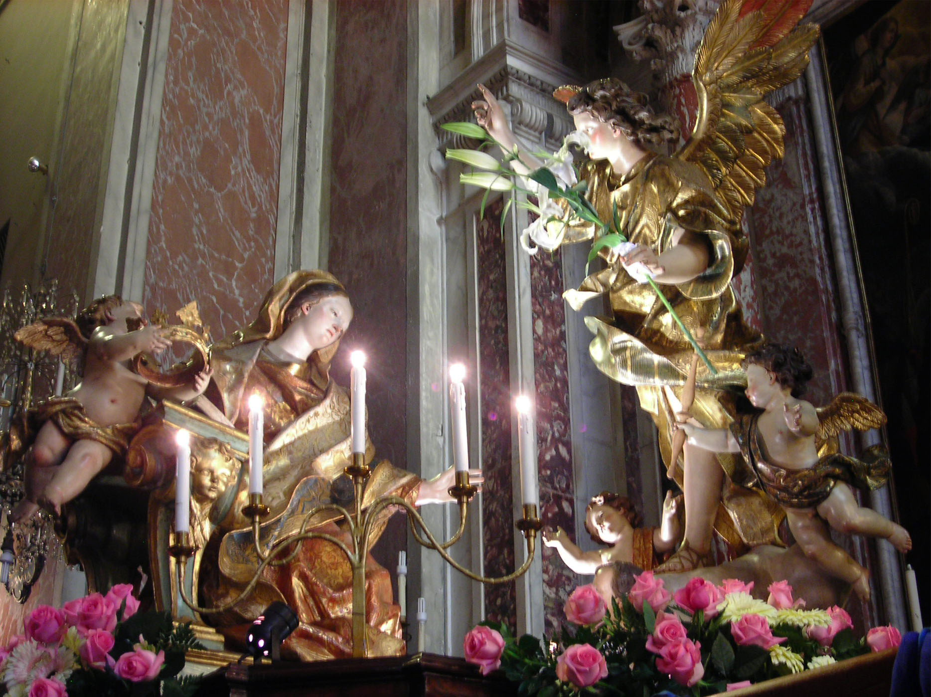 L'Annunziata, Anton Maria Maragliano 1717 circa